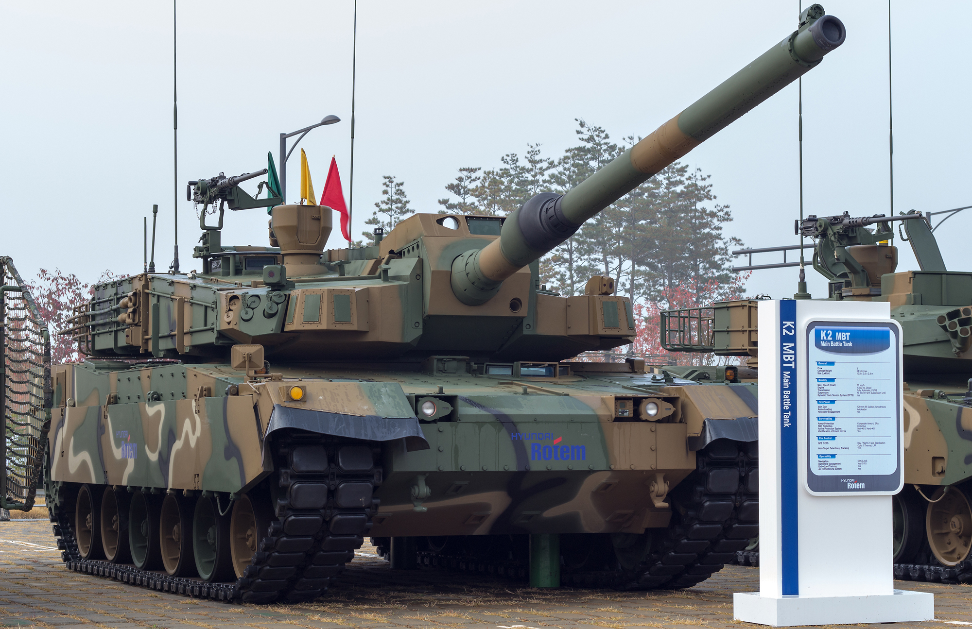 ADEX 2013에서 전시된 K2 흑표 전차